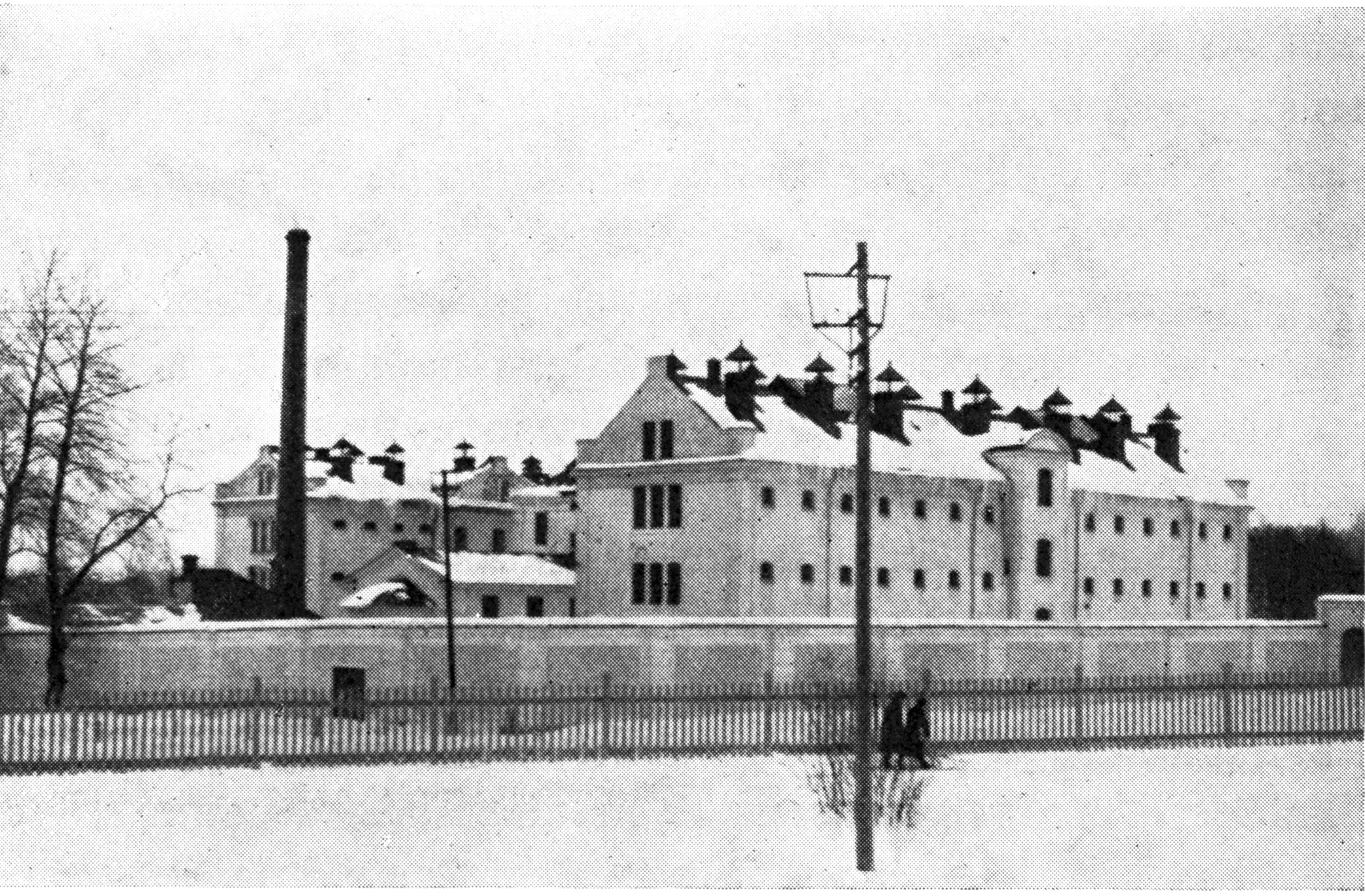 Länsfängelset i Härnösand